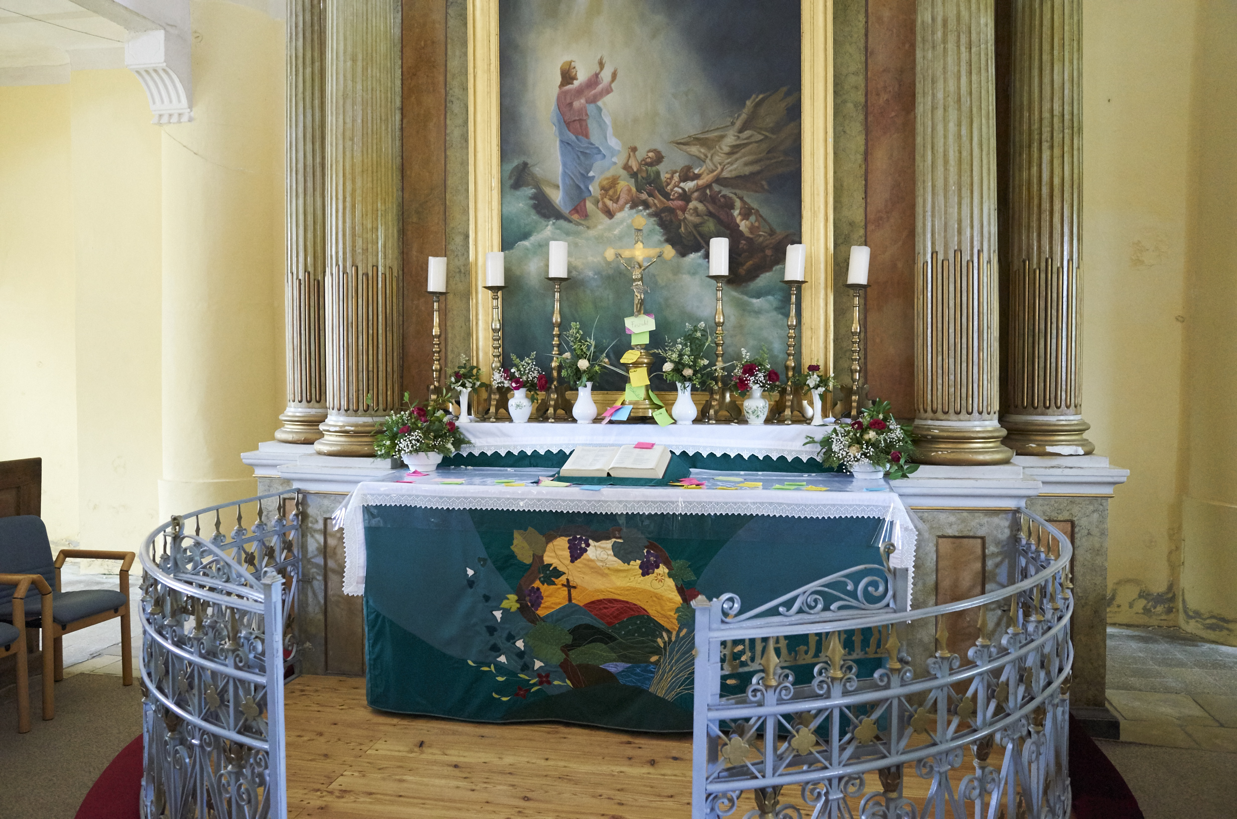 Altar der Lutherischen Kirche Ágfalva